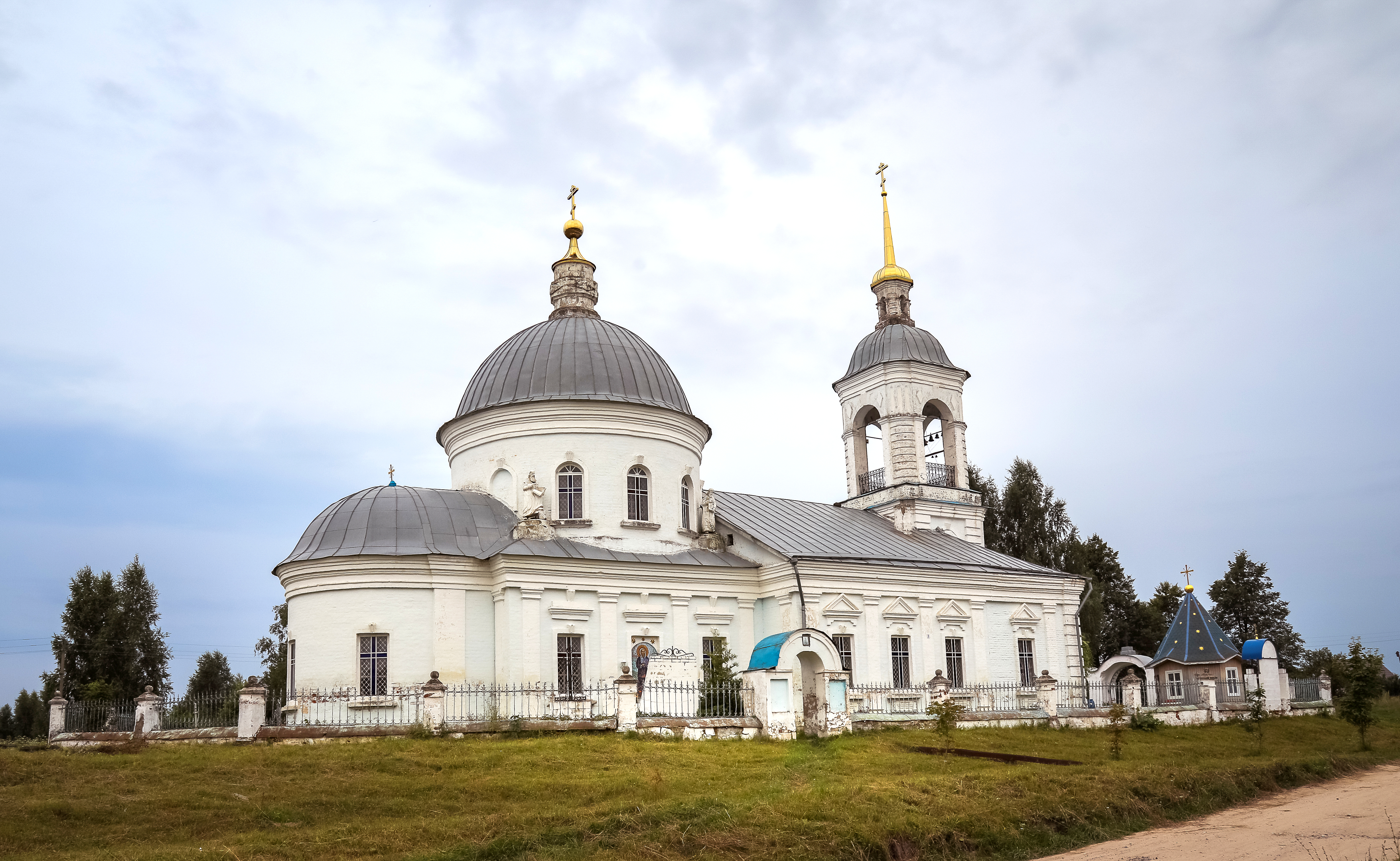 Церковь Спаса Нерукотворного. Село Борки, Рязанская область, Шиловский район.